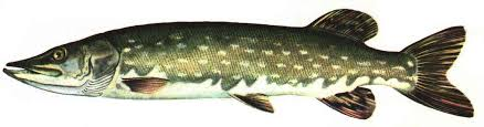 Szczupak